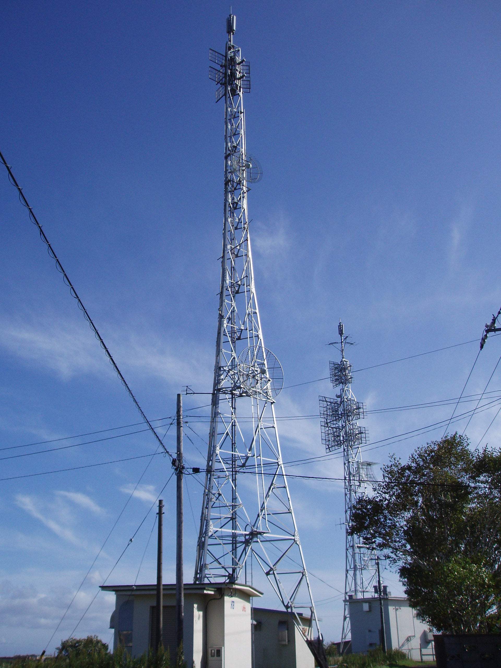 根室中継局（HBC・HTB・UHB）